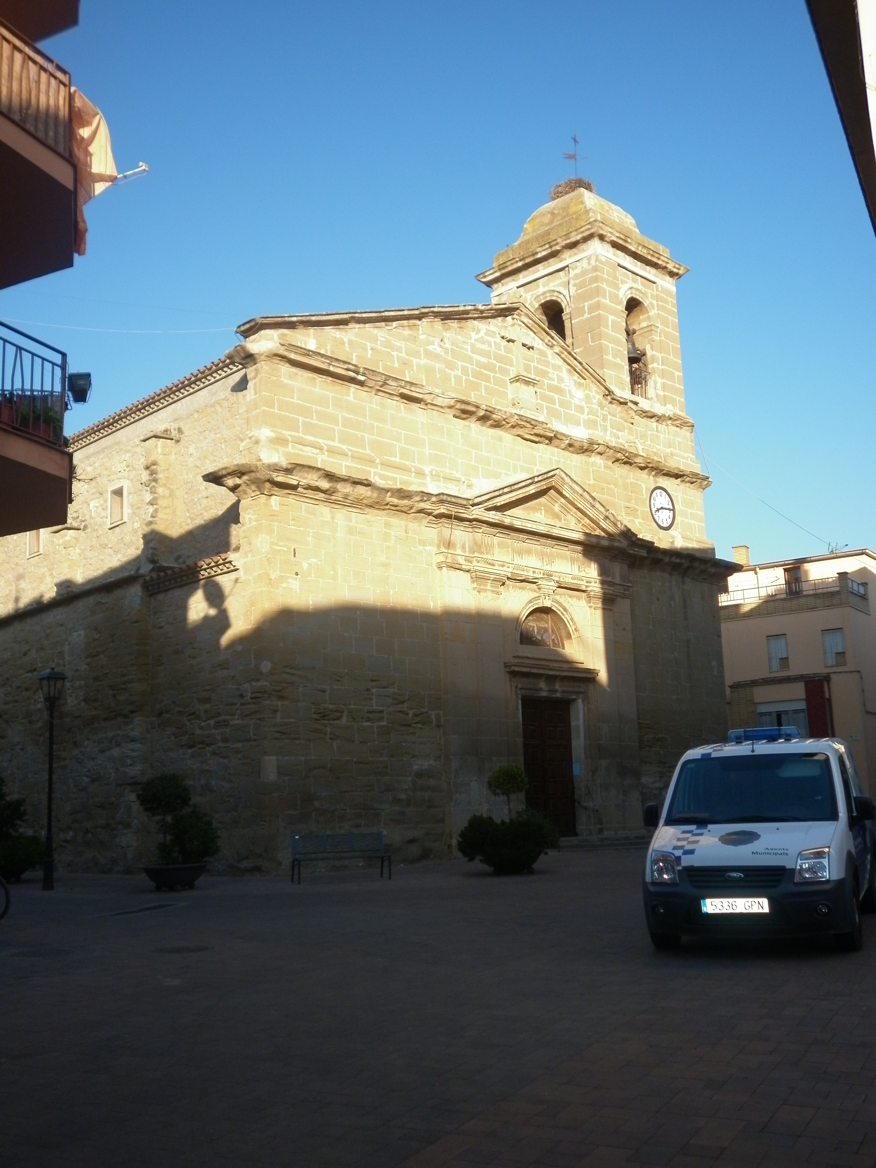 Neoclassicisme, s. XVIII